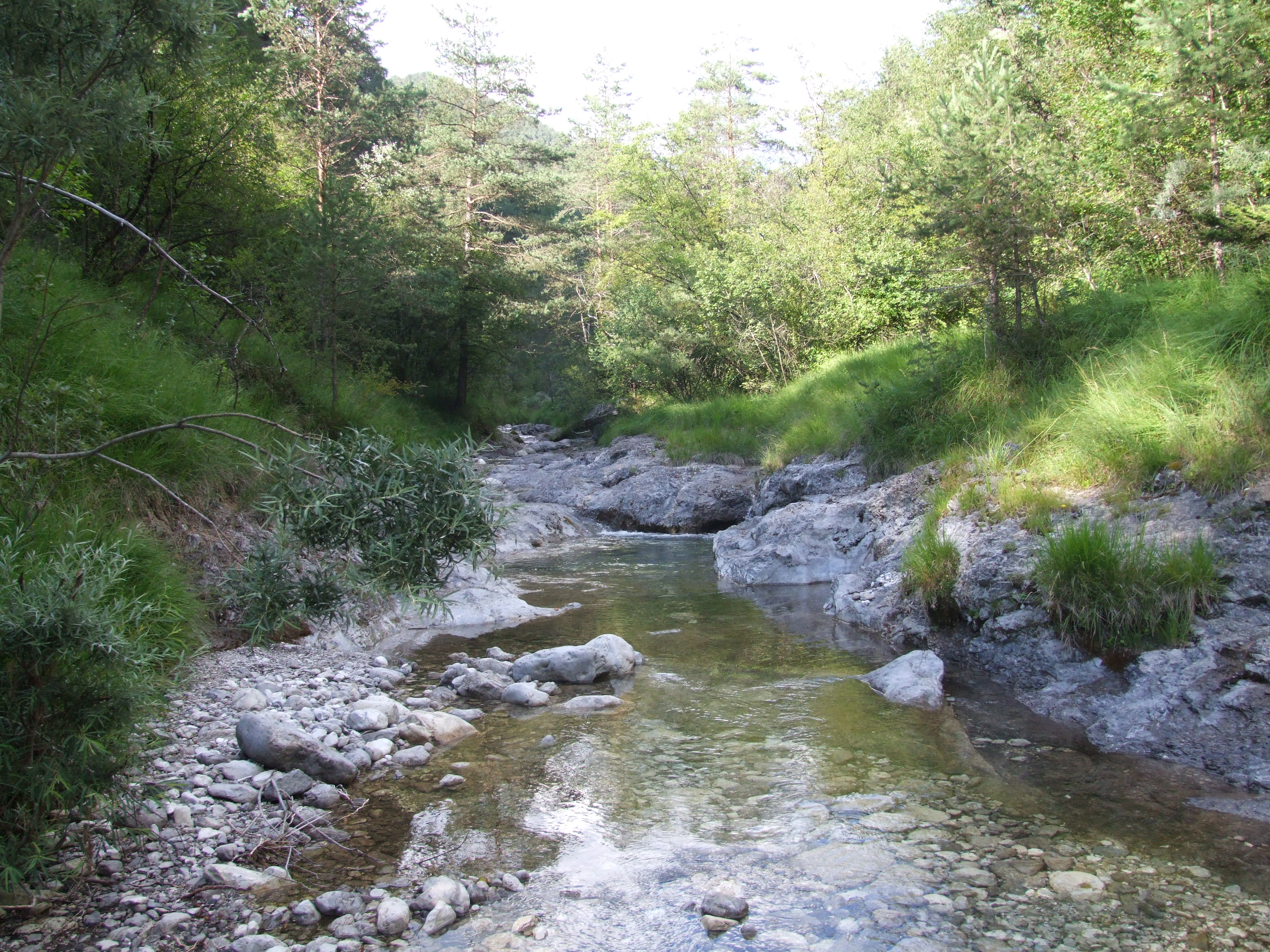 Torrente Droanello in Valvestino